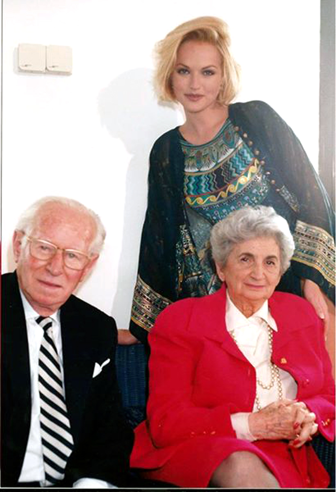 מייסדי גוטקס לאה וארמין גוטליב והדוגמנית גלית גוטמן